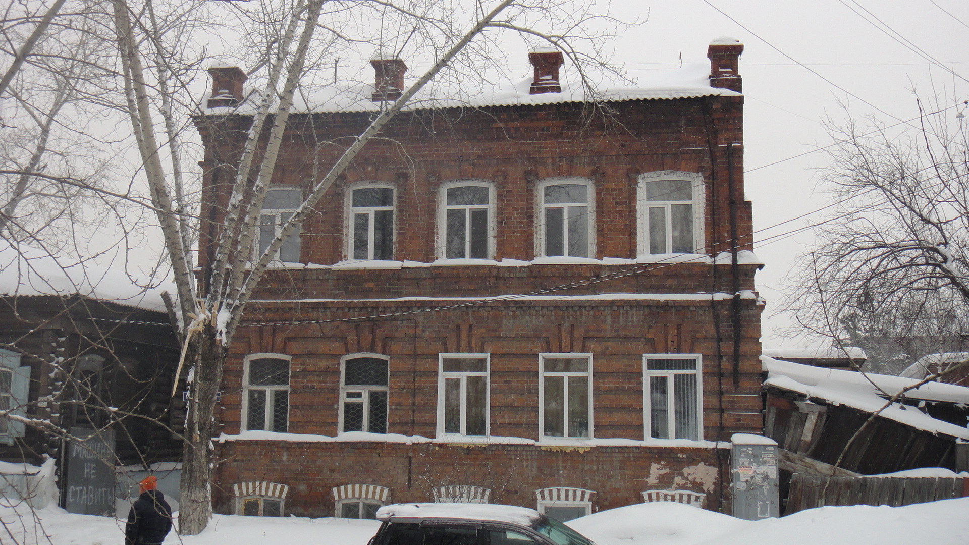 Улица Октябрьская (Томск), д. 32